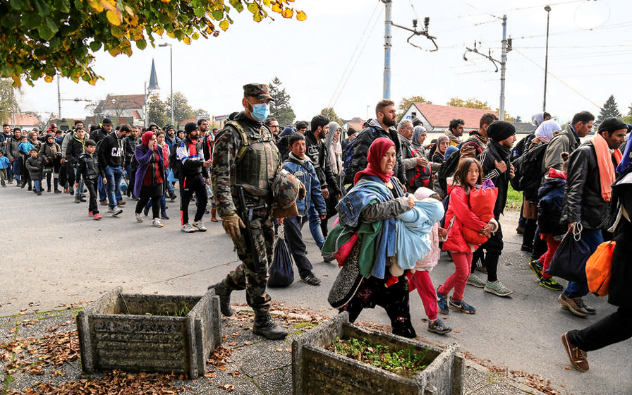 Slovenska vojska tudi med vikendom v velikem številu pri podpori Policiji.